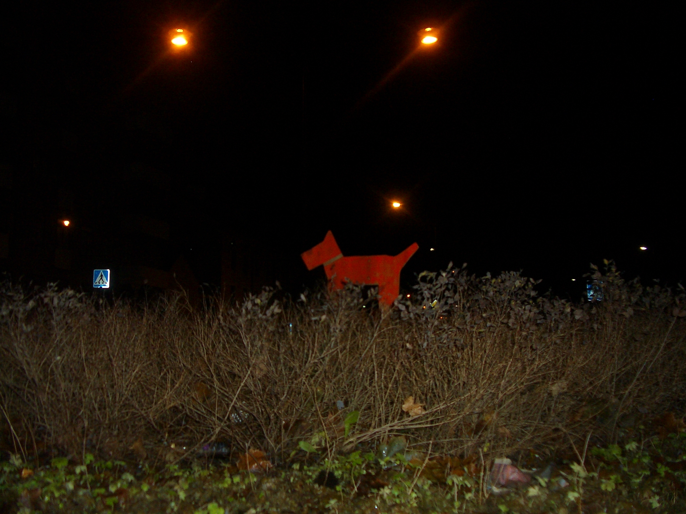 Rondellhund på Kyrkogårdsgatan i Uppsala november 2006